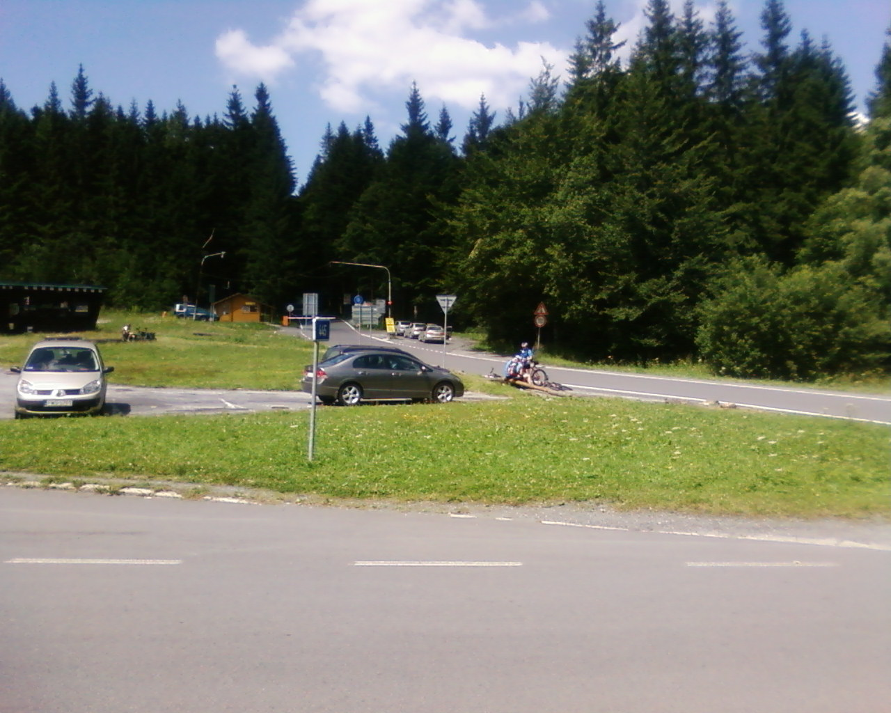 Hvězda